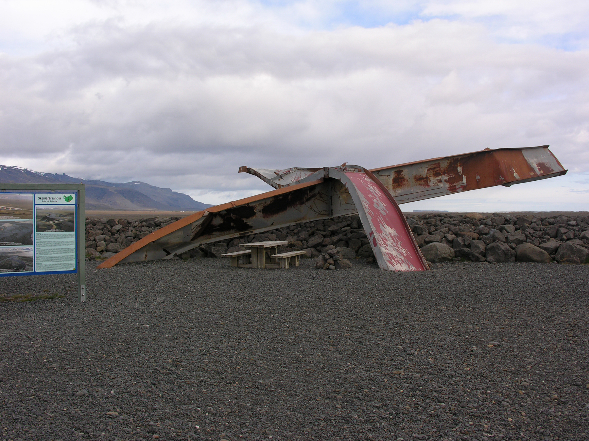 Iceland, Skeiðarársandur